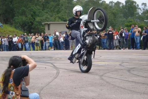 Rocam praticando Wheeling